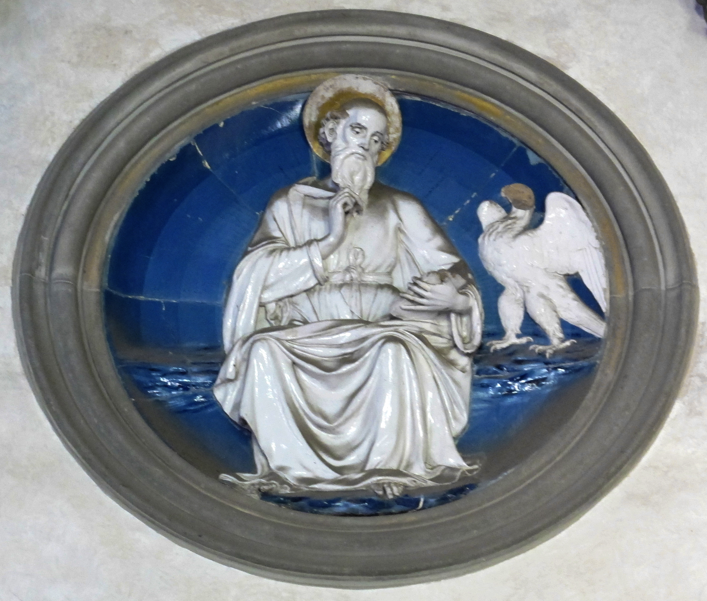 Cappella pazzi, apostoli di luca della robbia, san giovanni